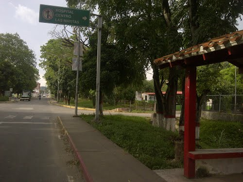 Avenida Miranda(Sarare)